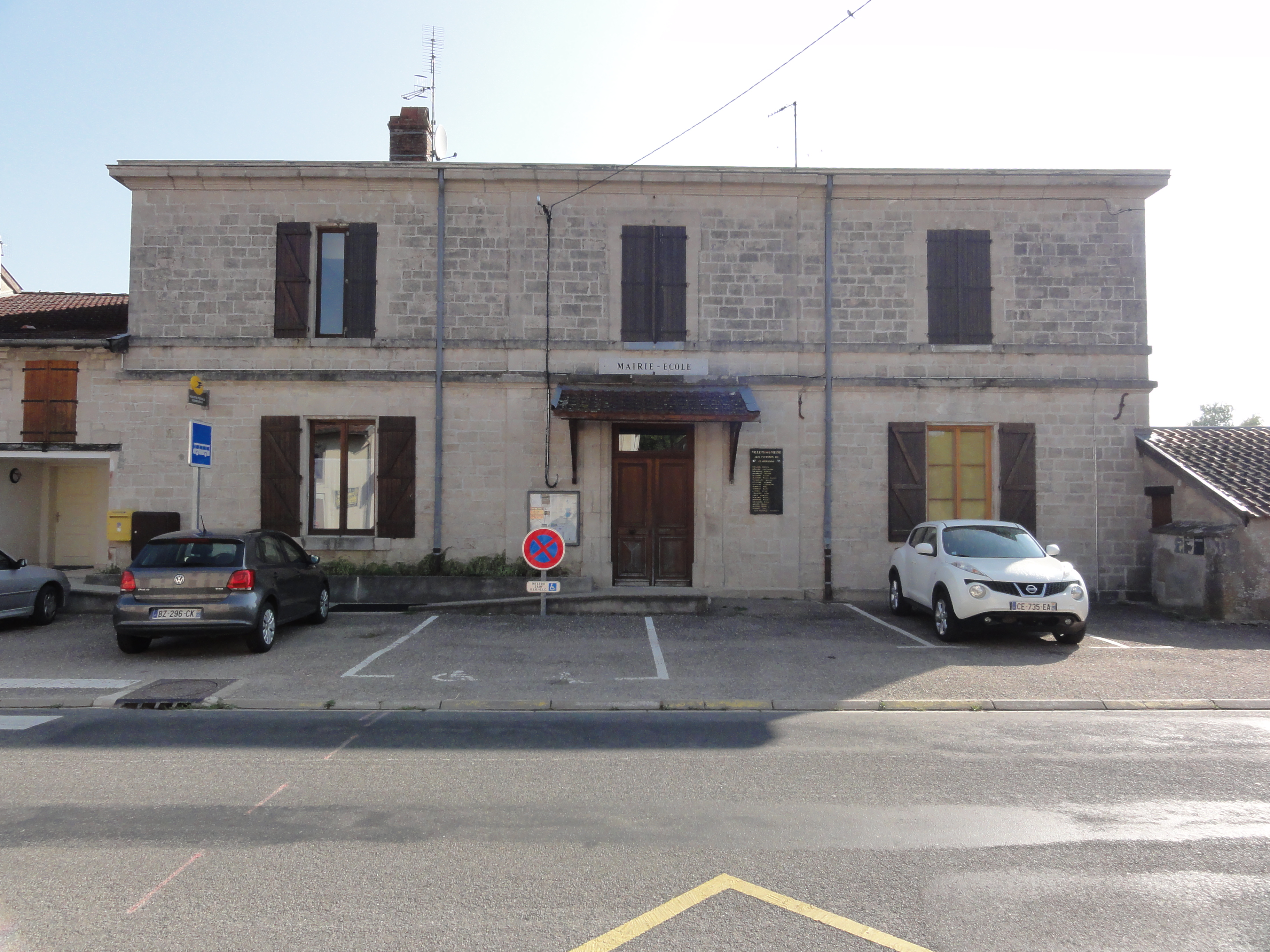 Villers-sur-Meuse (Meuse) mairie